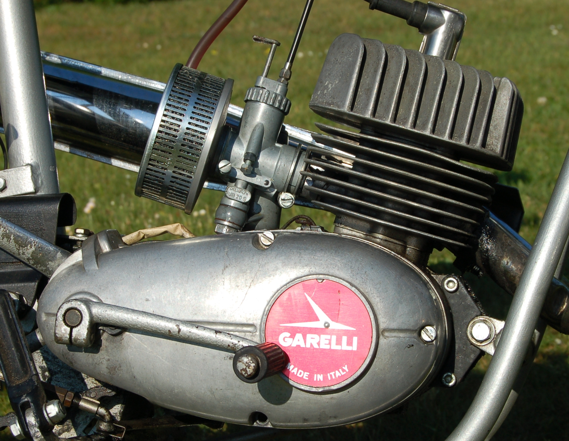 Motor eines Garelli Cross Kleinkraftrades, Baujahr 1968